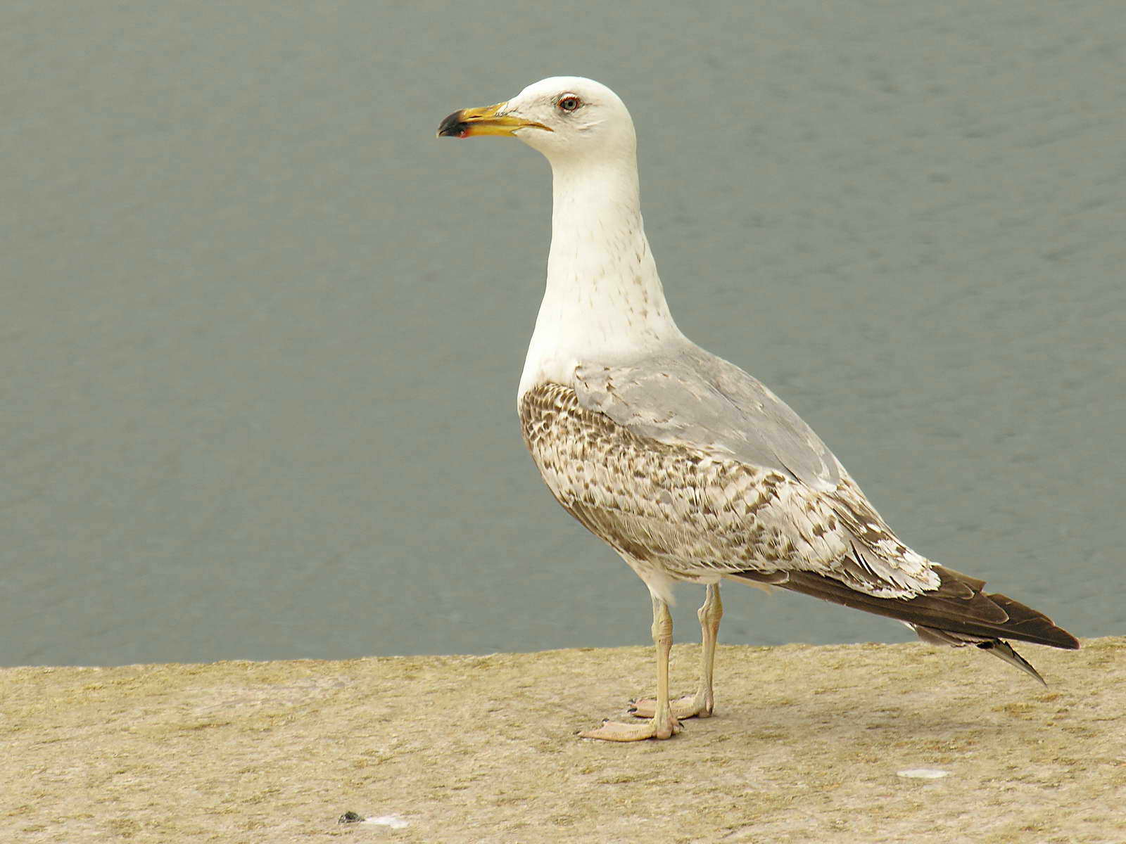 Gaivota Larus michahellis en Porto, Portugal Publish by= Luis Miguel Bugallo Sánchez. Self made